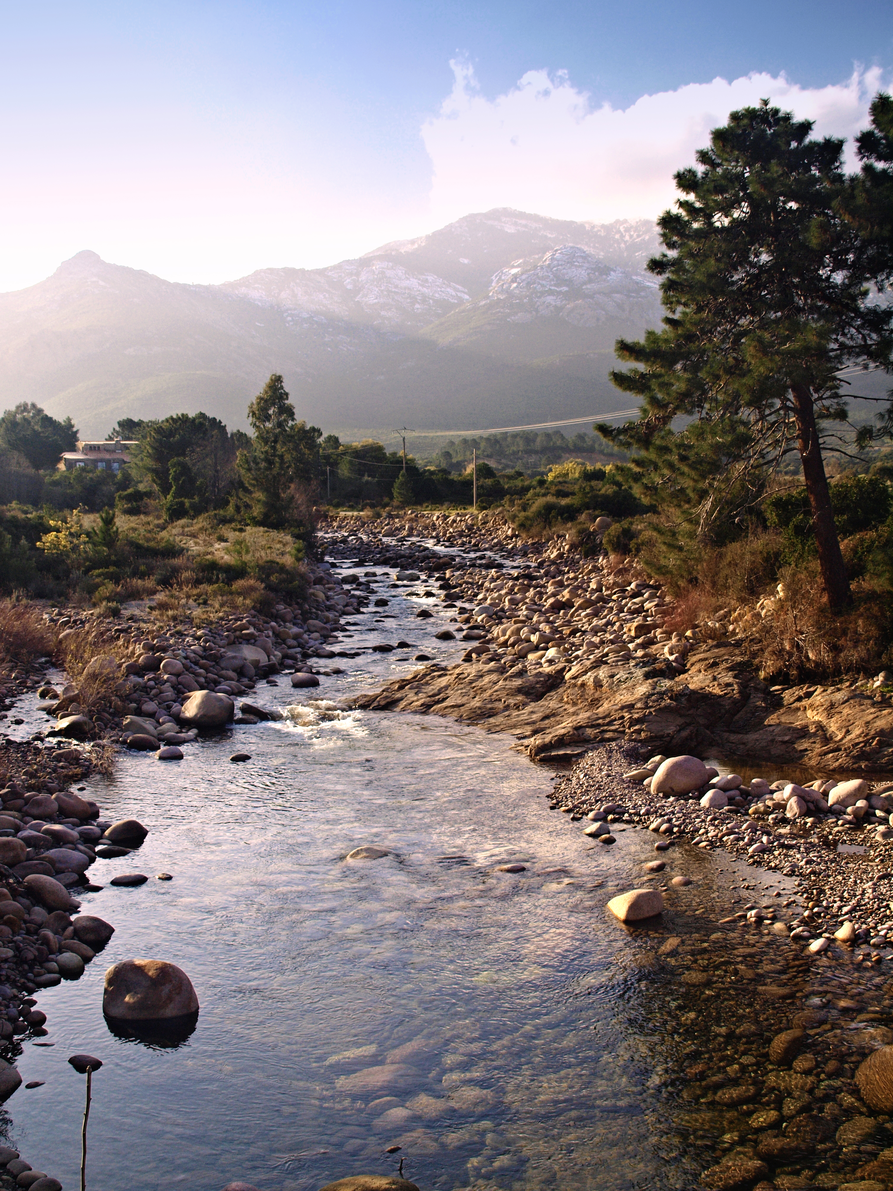 Moncale (Corsica) - La Figarella en amont du pont